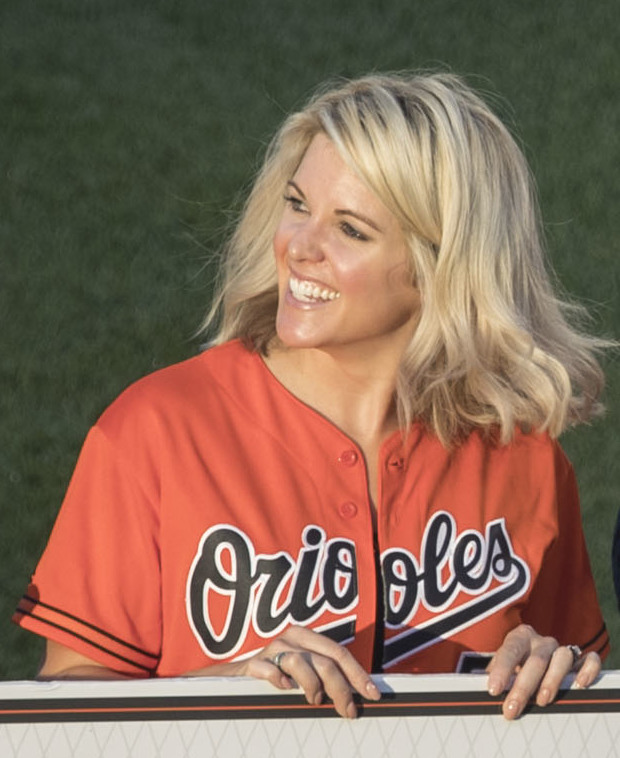 Blue Jays at Orioles 8/29/16